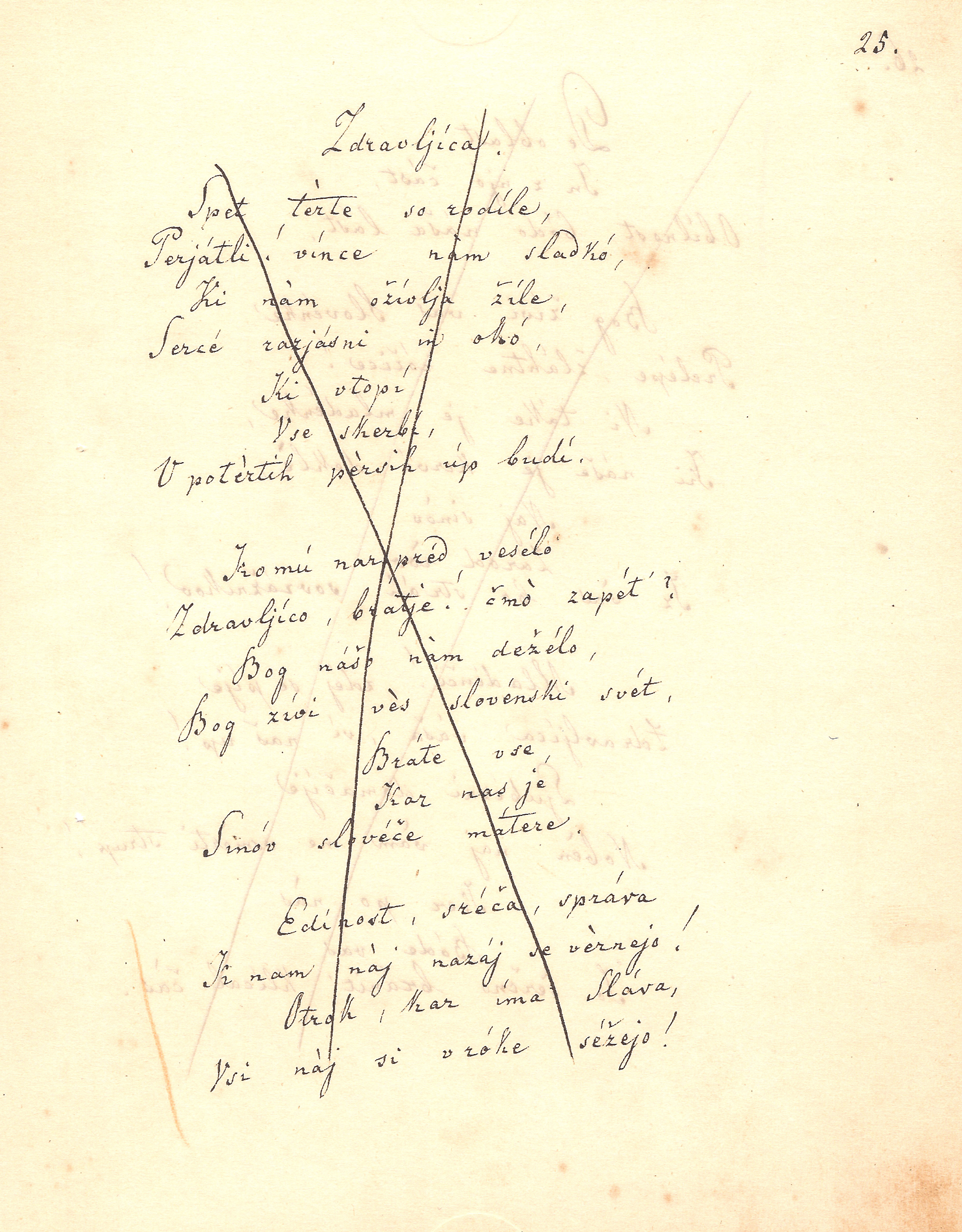 Prečrtana kitica Zdravljice.